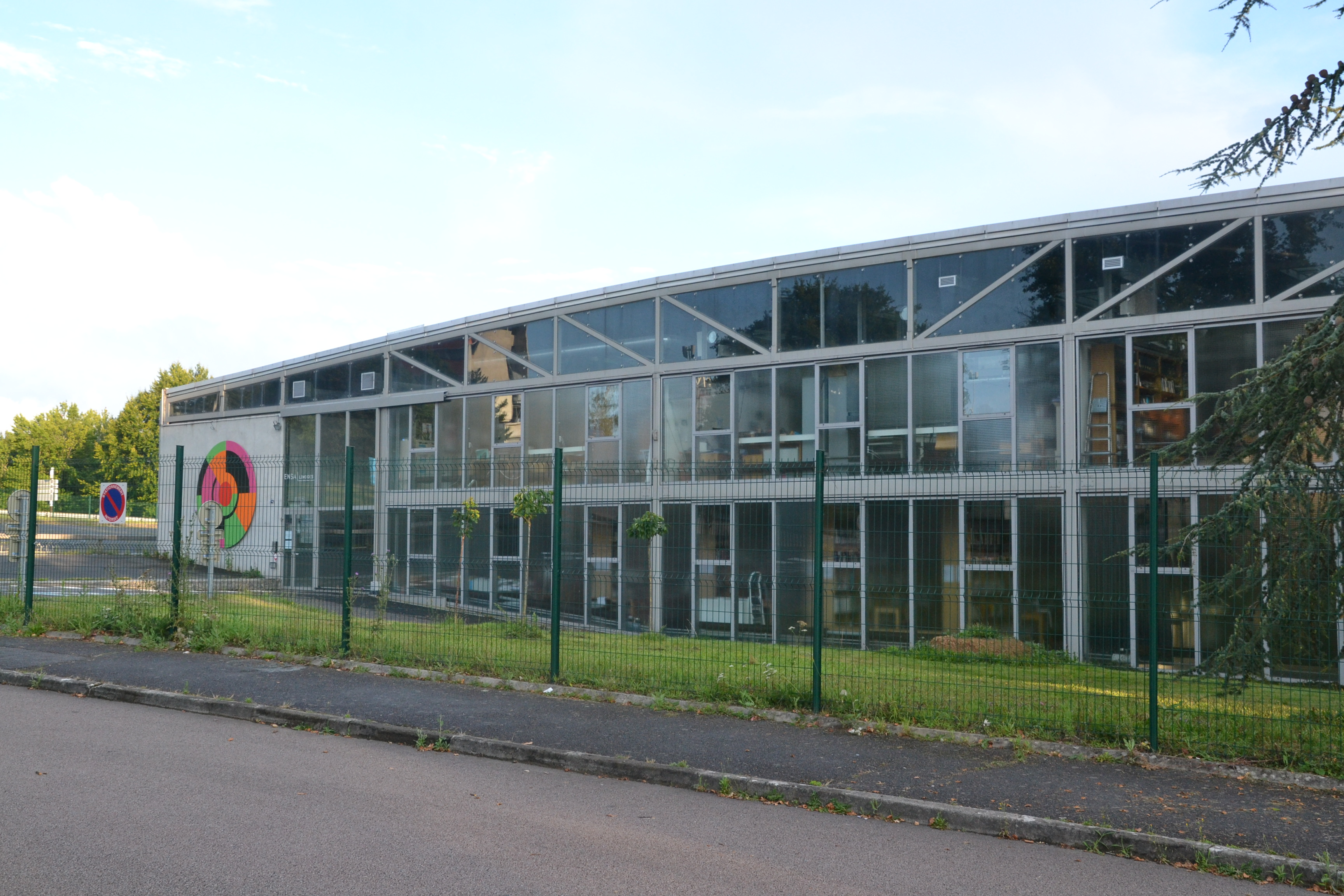 L'école nationale supérieure d'art de Limoges (Haute-Vienne, France).